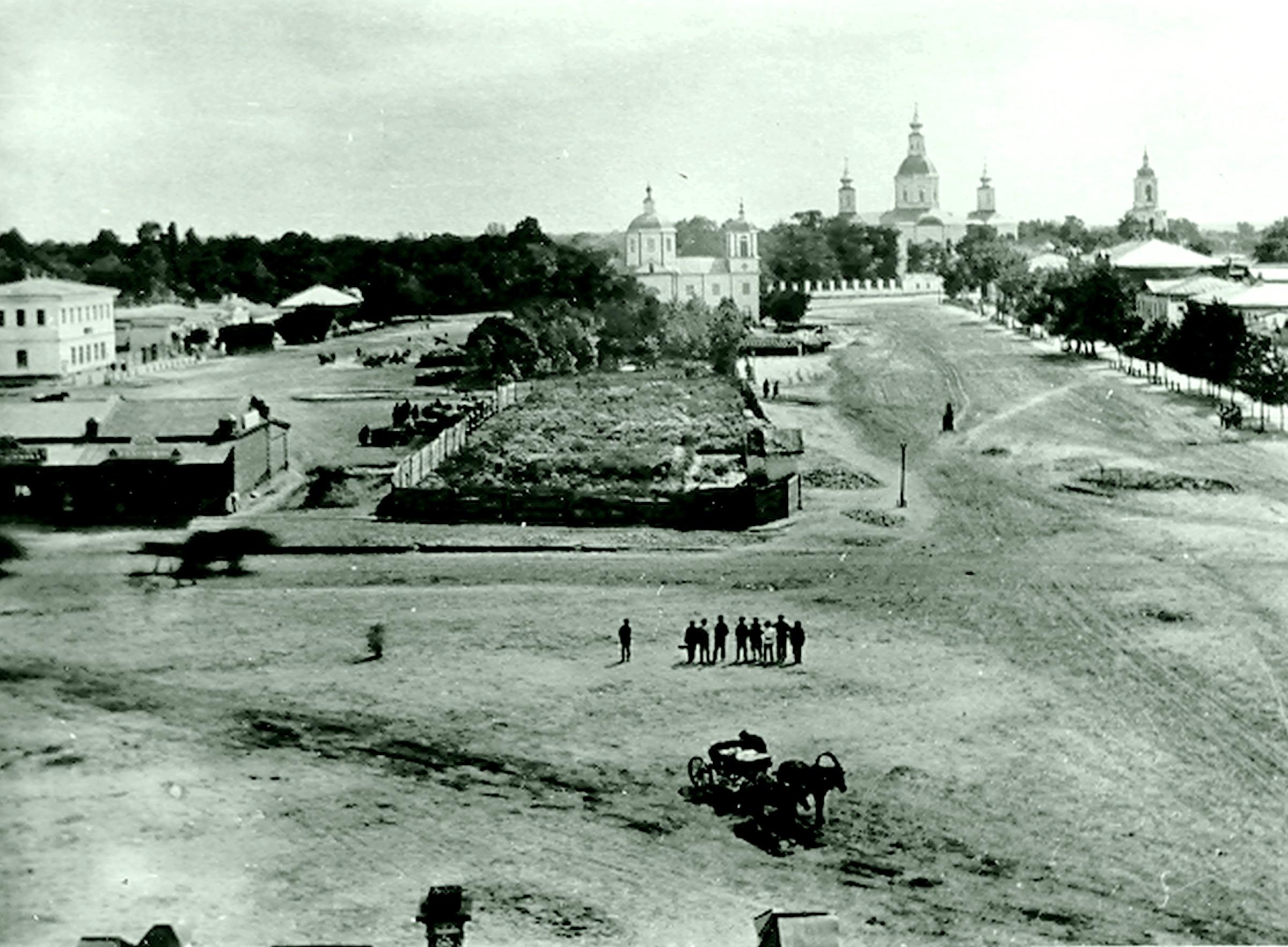 Одна из первых фотографий г. Ахтырка. Справа к Покровскому Собору идет ул.Октябрьская (в современном расположении улиц).